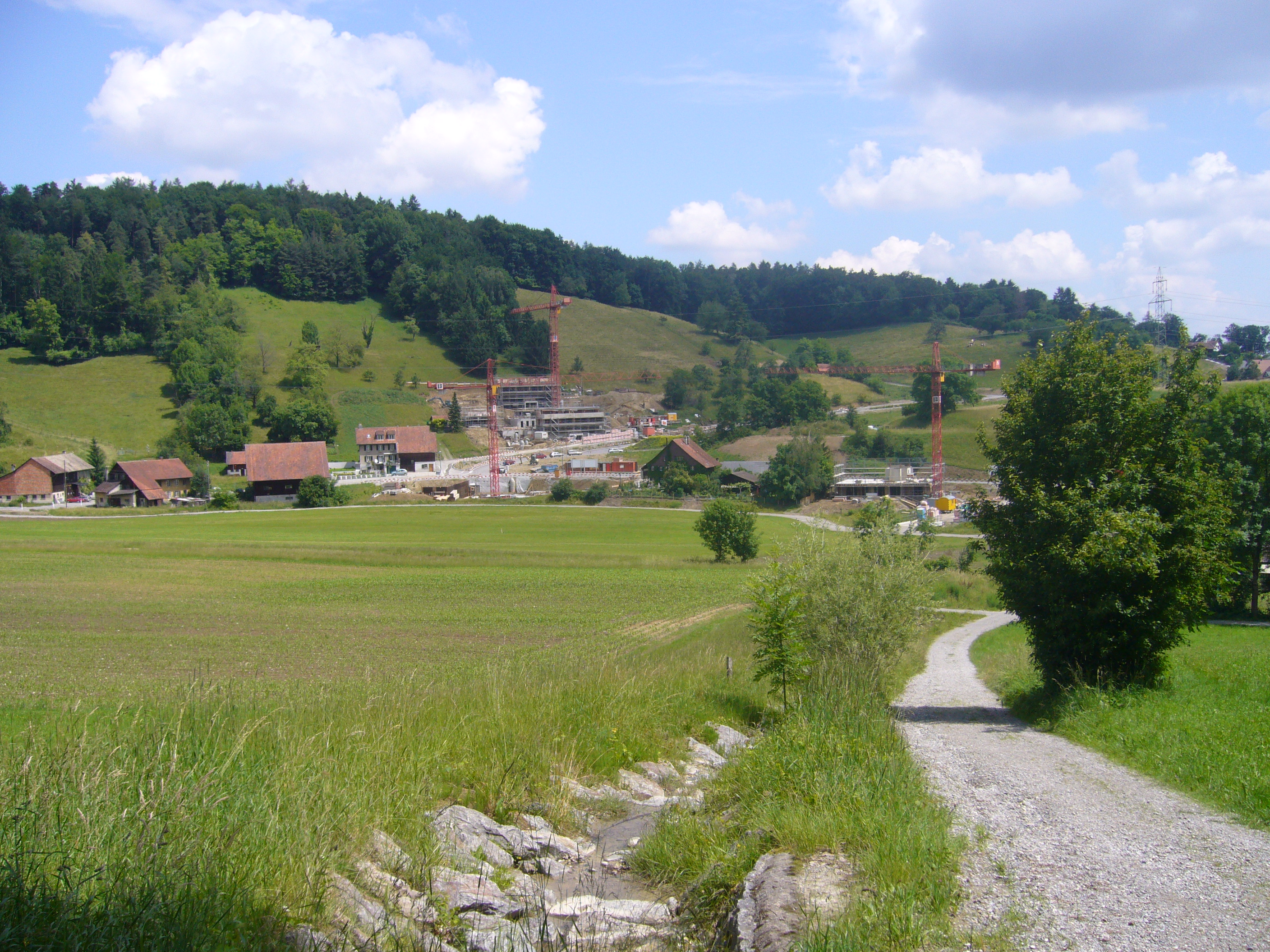 Blick auf Häuser und Baustellen im Dättnau.